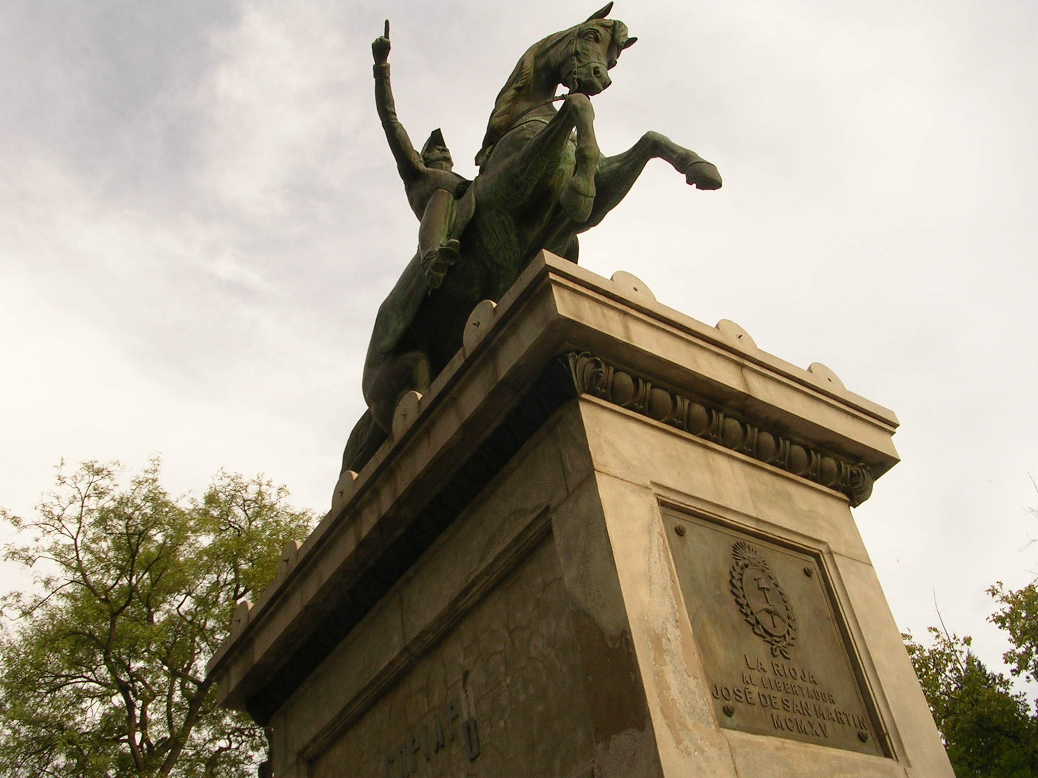 Estatua de José de San Martín en La Rioja (Argentina)